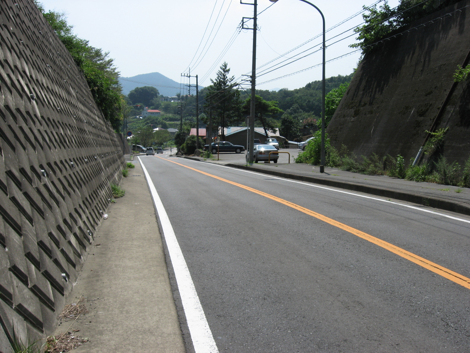 神奈川県道513号線